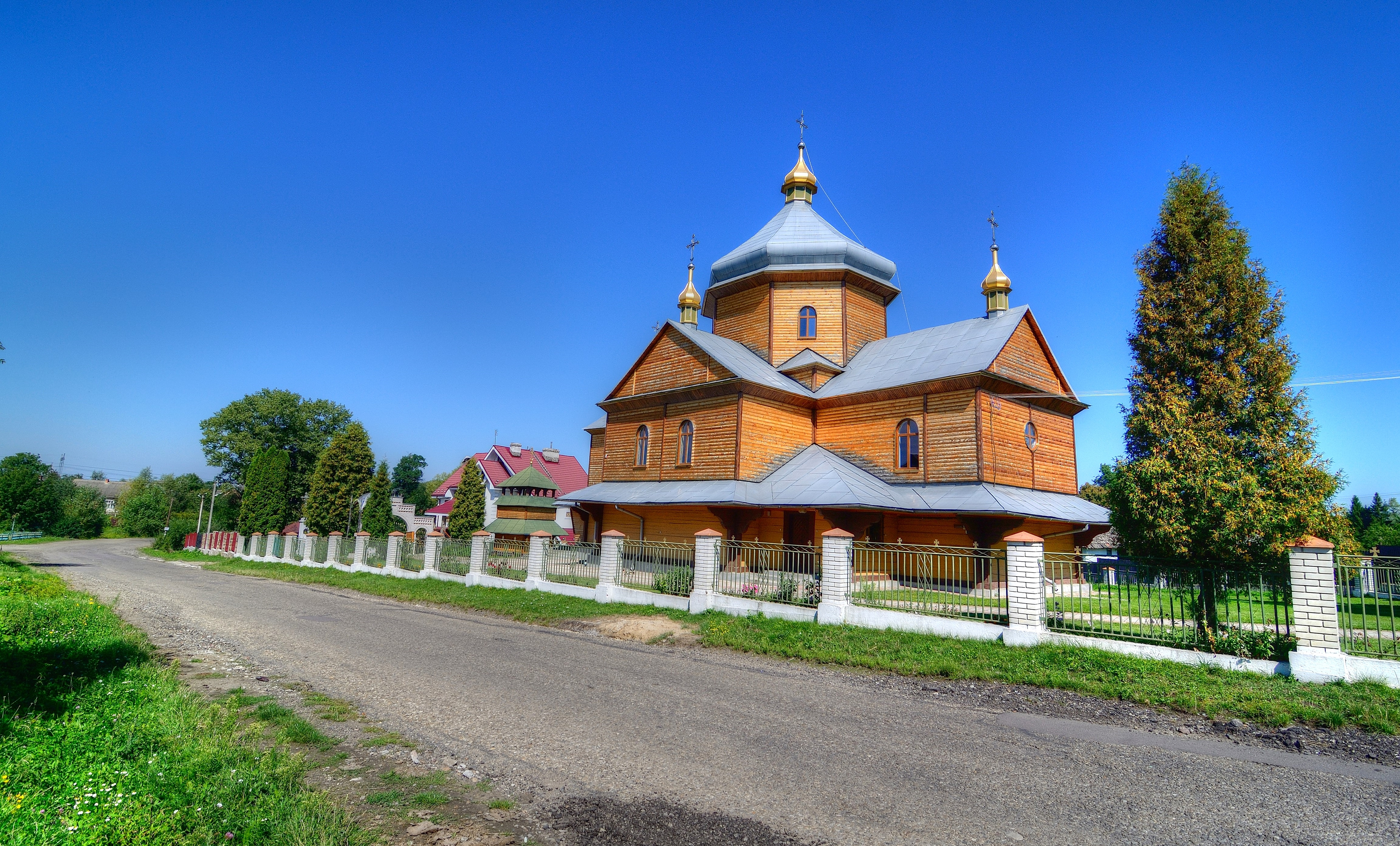 Церква